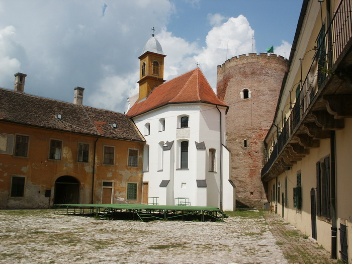 Dvorska kapela Sv. Trojstva i srednjovjekovna kula u dvoristu dvorca Prandau-Normann u Valpovu